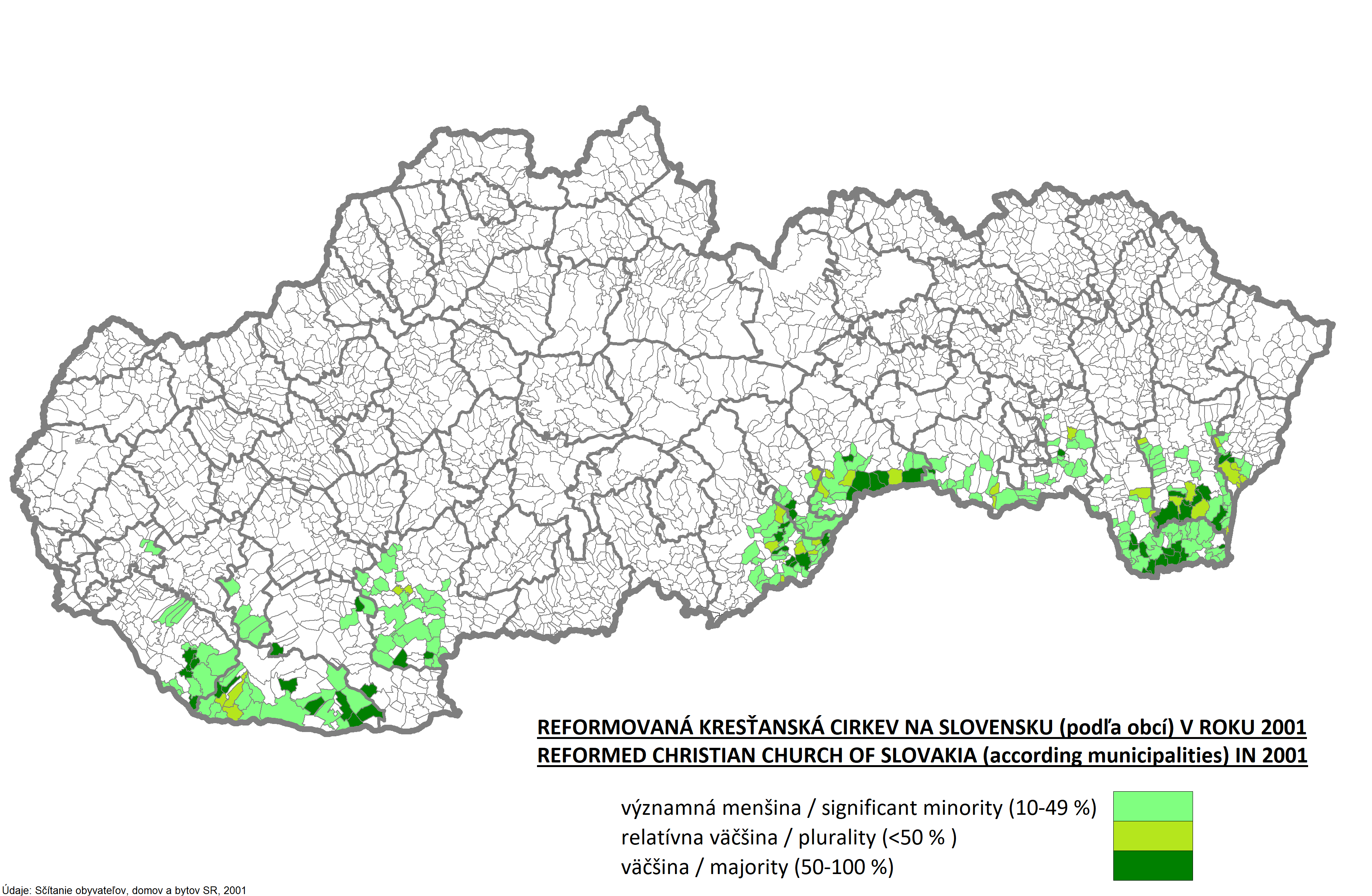 Reformovana krestanska cirkev SR 2001